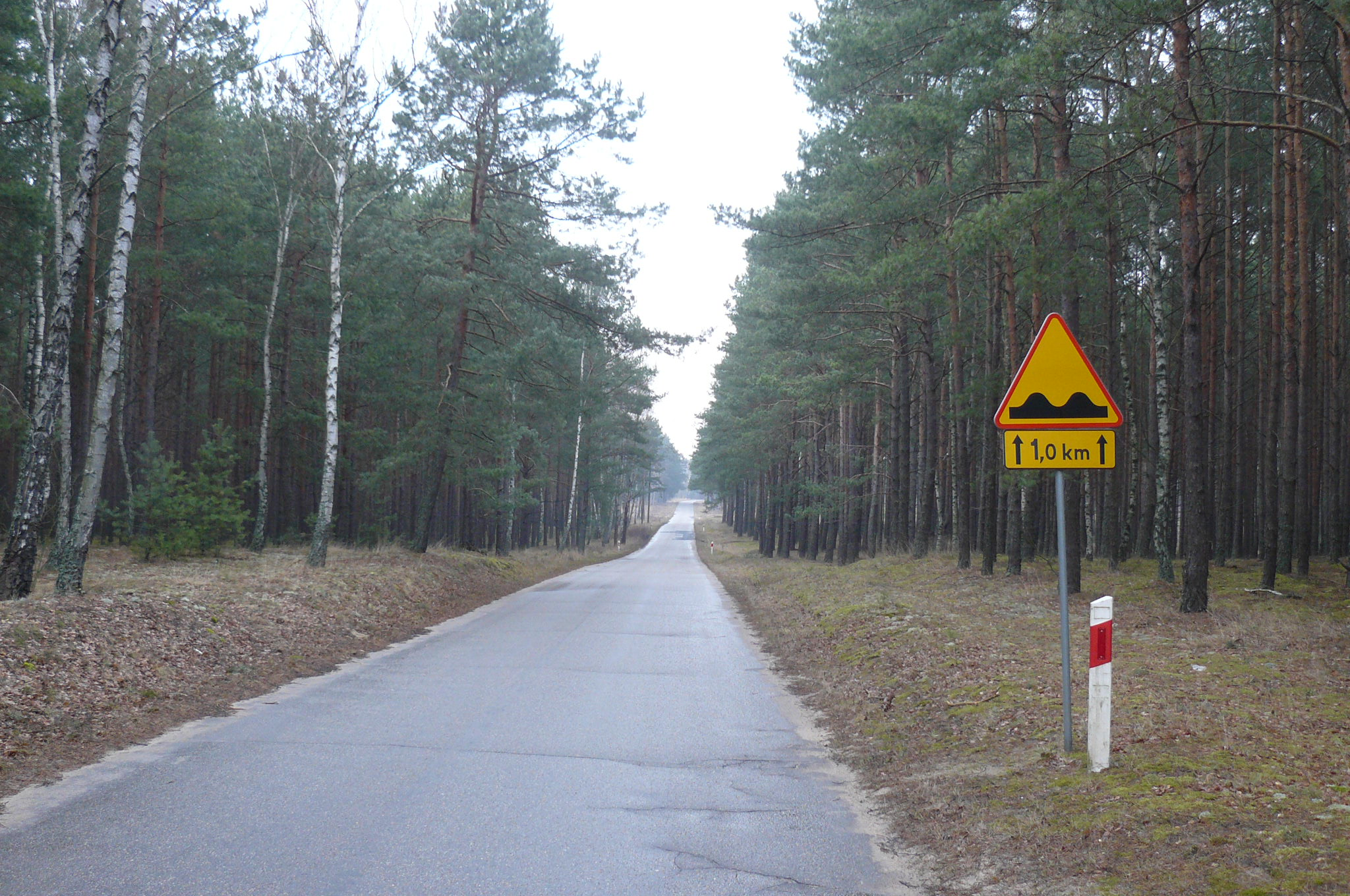 Gmina Drawsko, okolice Kamiennika. DW nr 133.